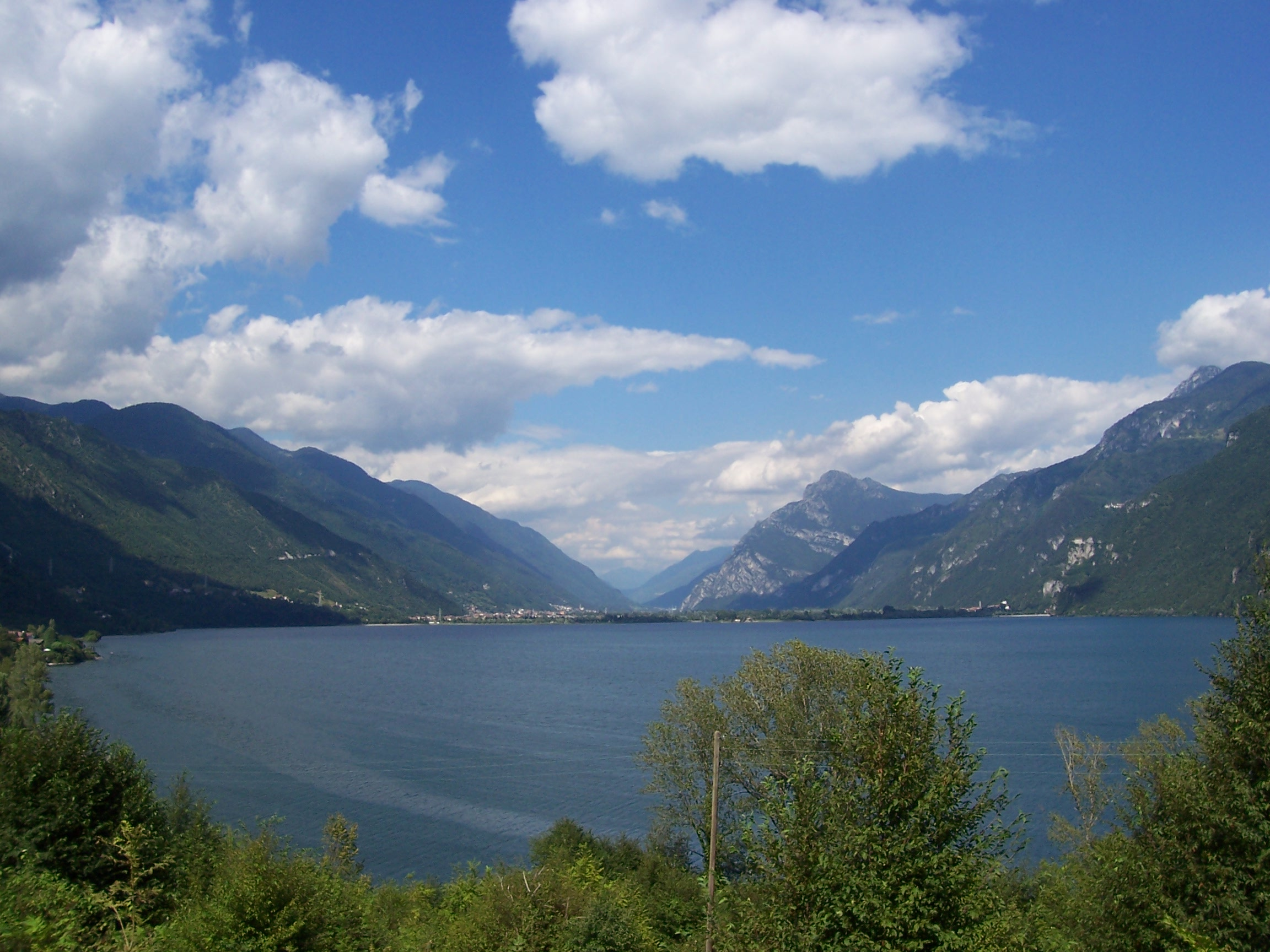 Cadria fotografia Ponte Caffaro, lago d'Idro e Valle del Chiese Pubblico dominio